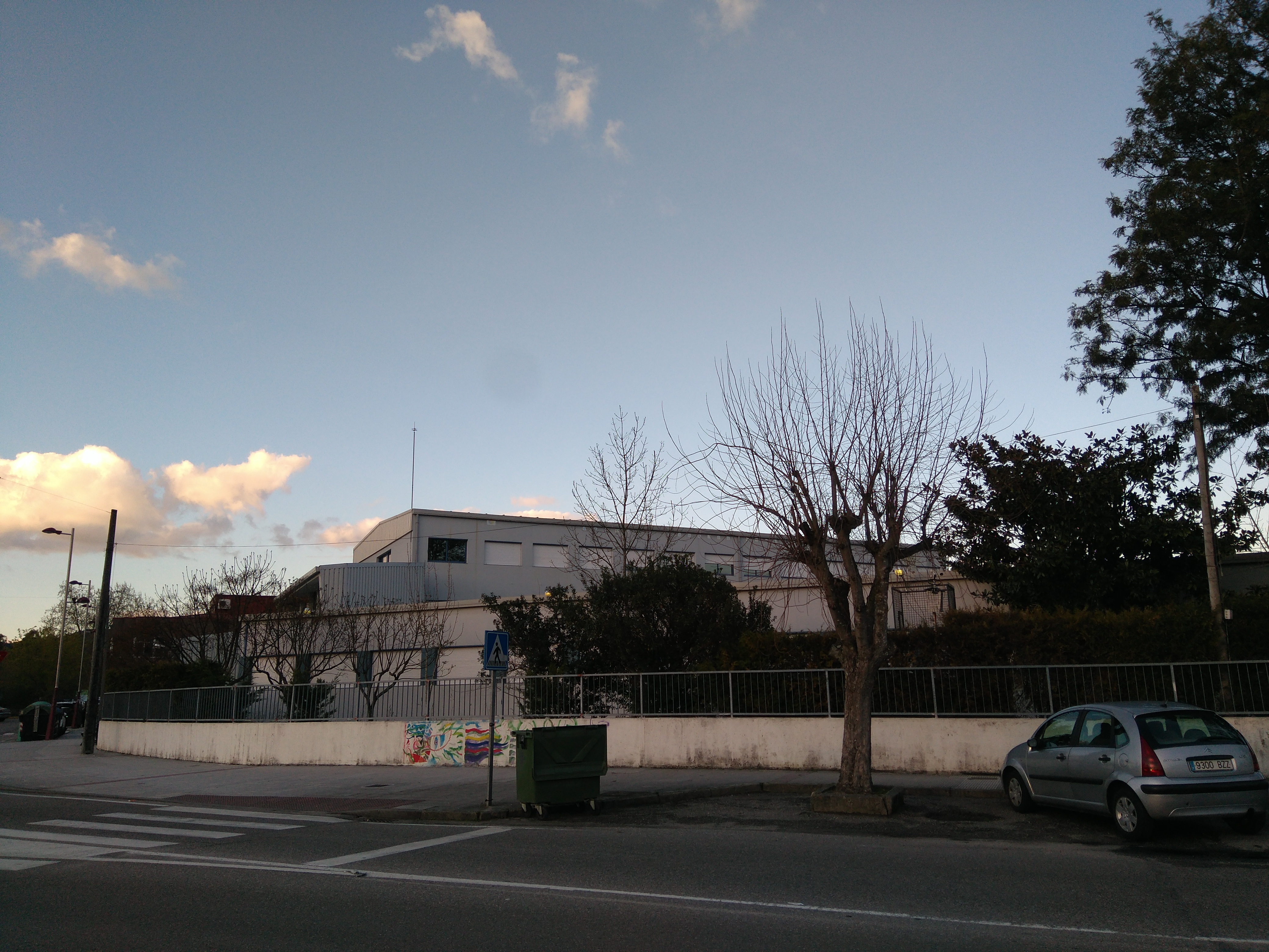 IES Illa de San Simón, en Redondela.